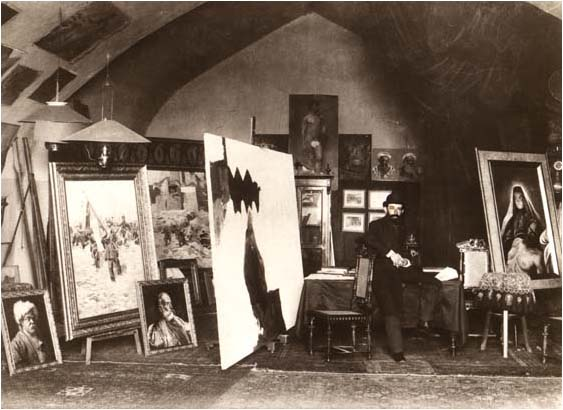 Gigo Gabashvili